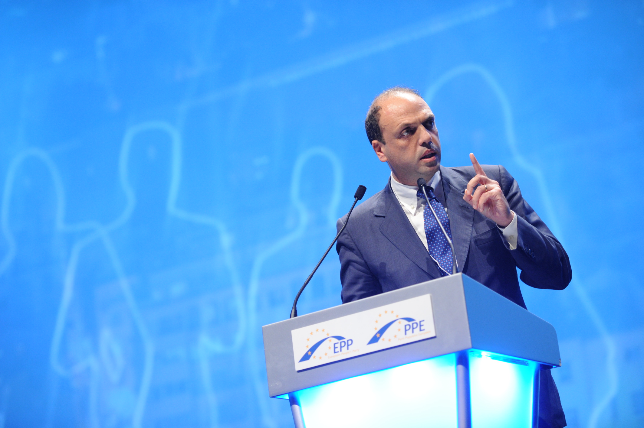 EPP Congress Marseille 2001, Angelino Alfano